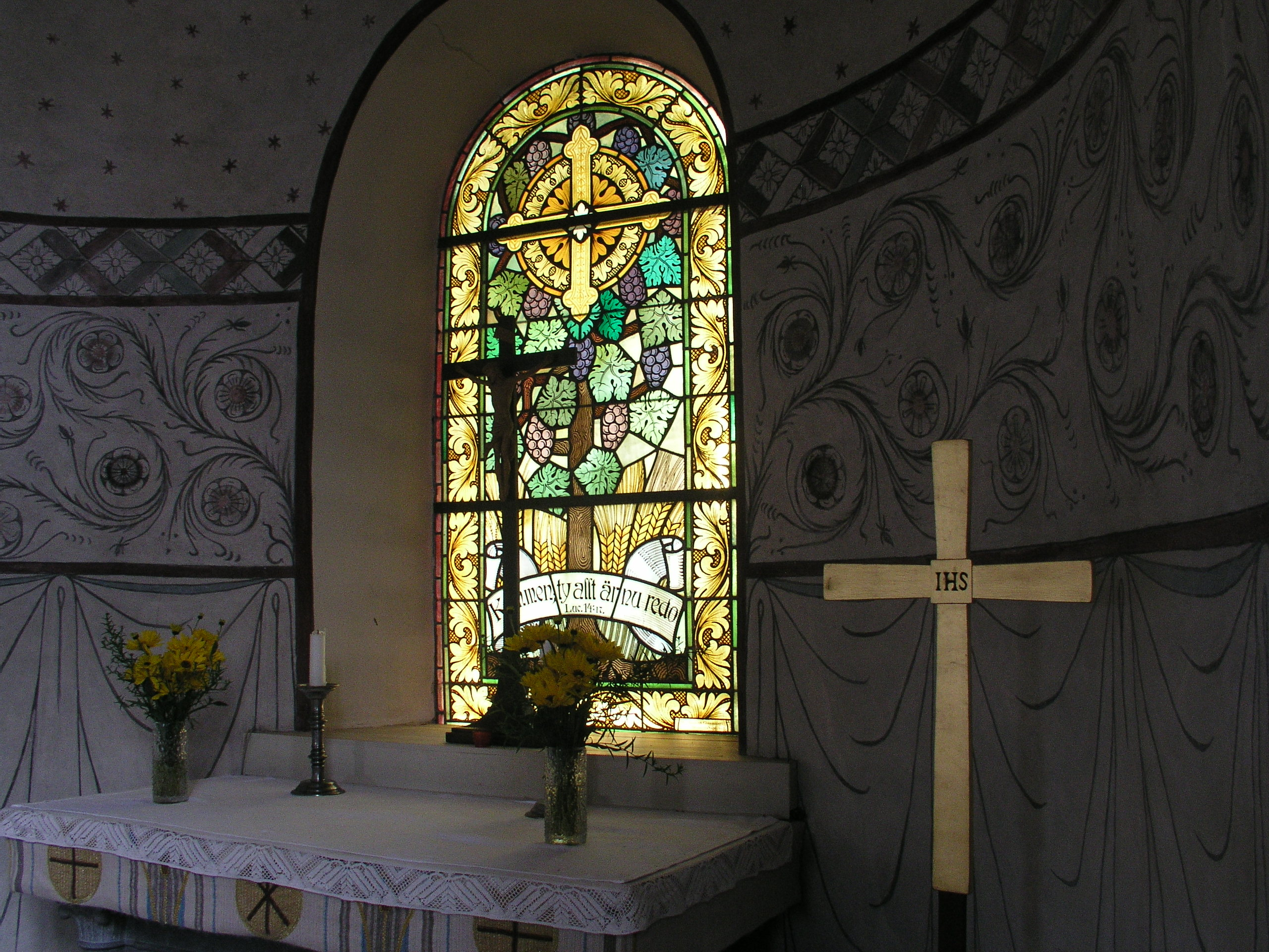 Kaga kyrka / Kaga church. Linköping, Sweden. Altar.